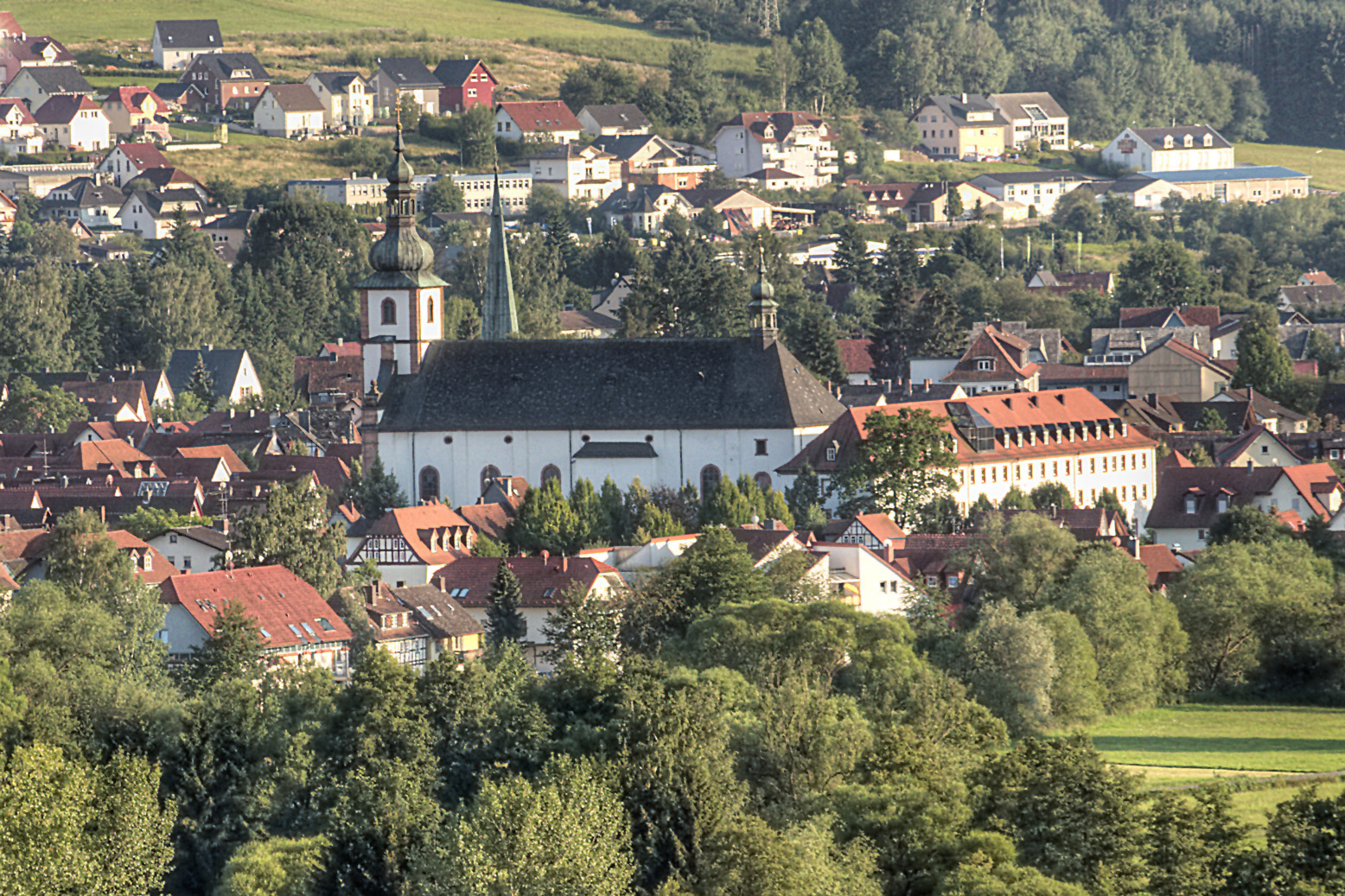 Franziskanerkloster mit der Pfarrkirche St. Peter und Paul in Salmünster. Der älteste Teil des Klosters stammt aus dem Ende des 17. Jahrhunderts. Die barocke Pfarr- und Klosterkirche St. Peter und Paul wurde zwischen 1737 und 1745 nach den Plänen des Hofbaumeisters Andreas Gallasini erbaut. Fotografiert vom Turm der Burgruine Stolzenberg